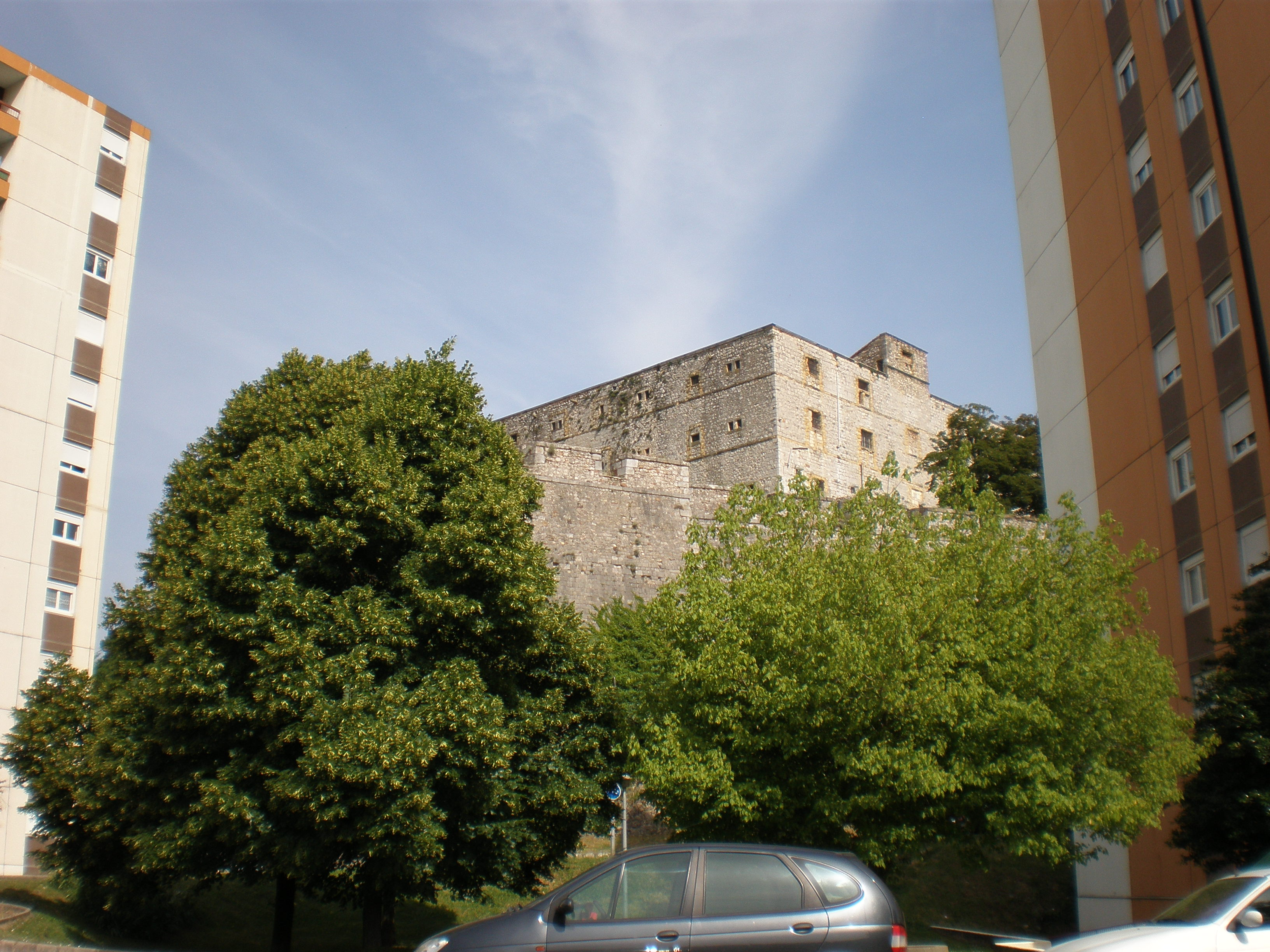 Le fort Vauban à Alès (Gard)